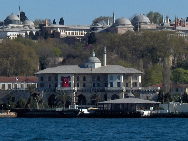 Sepetçiler Palace; Istanbul, Turkey